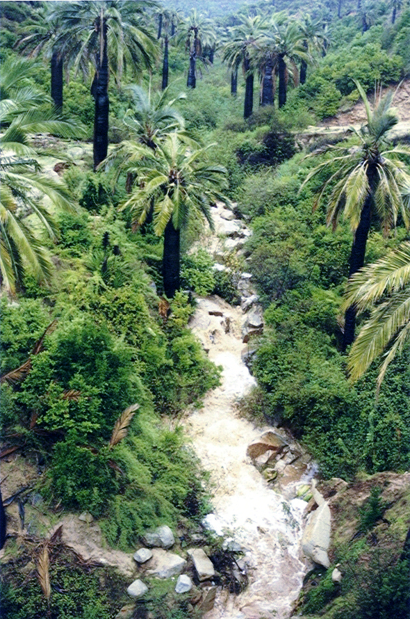 Invierno. Santuario de la Naturaleza Palmar El Salto. Quebrada El Quiteño. Palma chilena, Jubaea chilensis